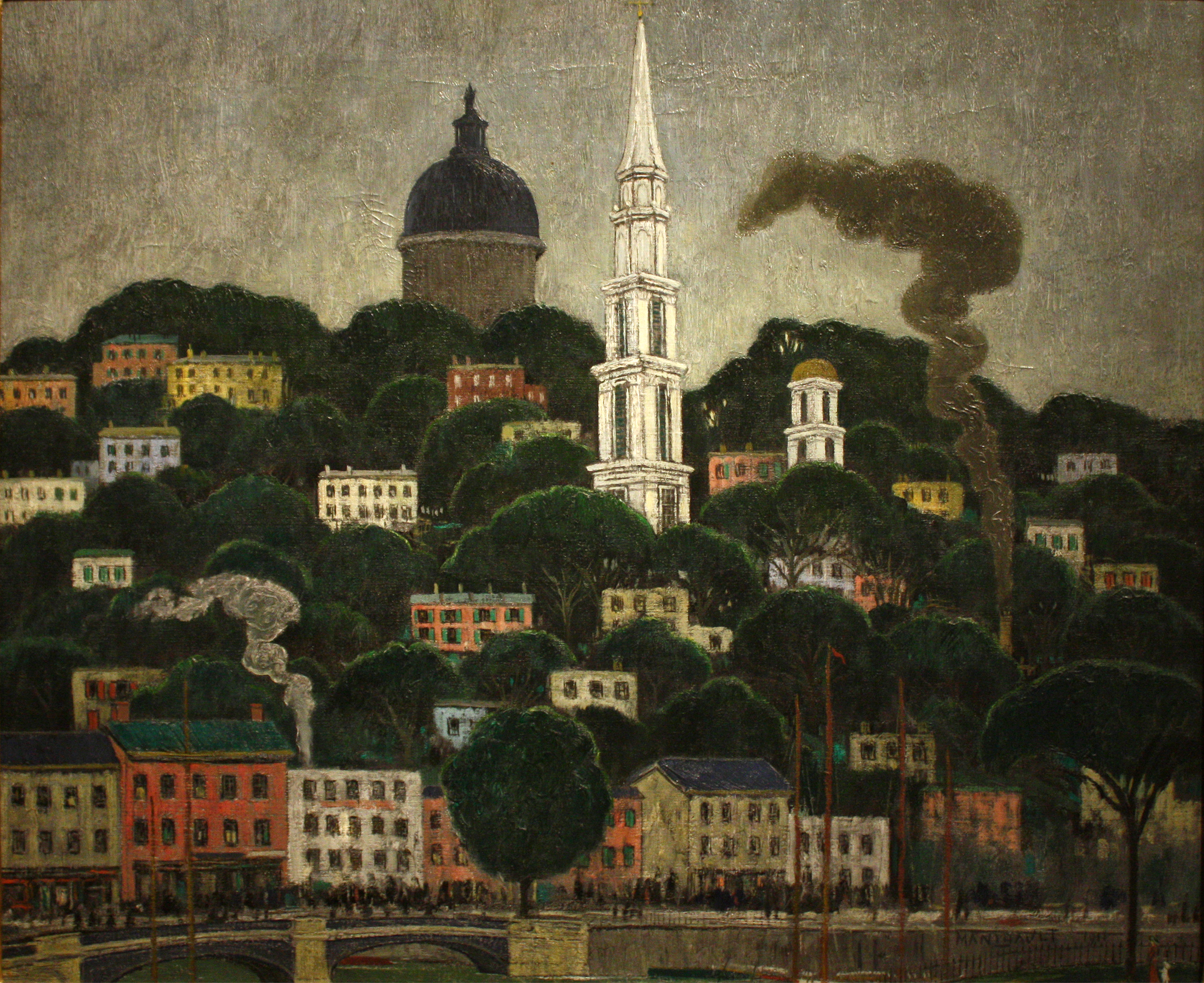 Scene depicts Providence, Rhode Island